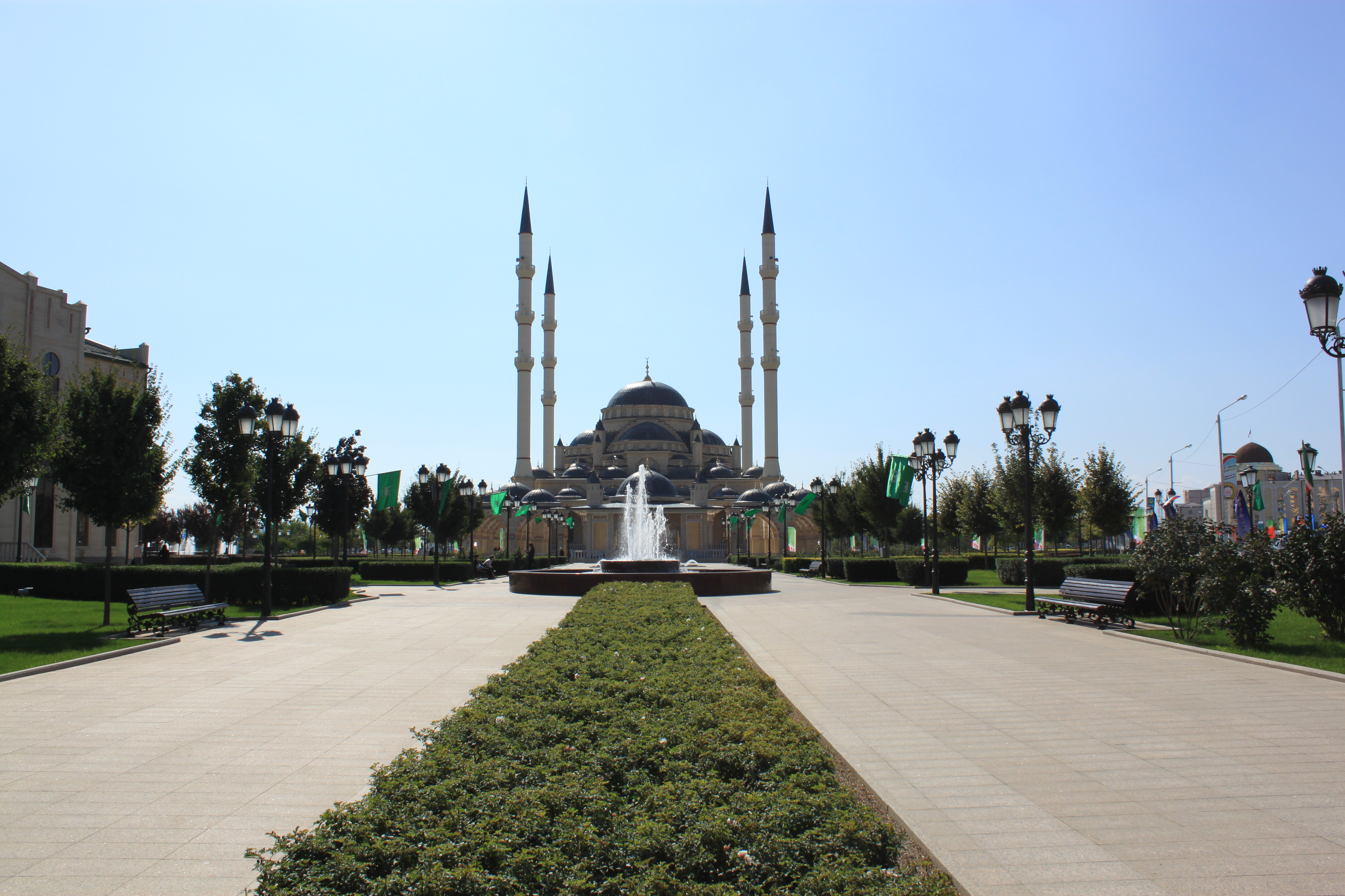 Мечеть Сердце Чечни